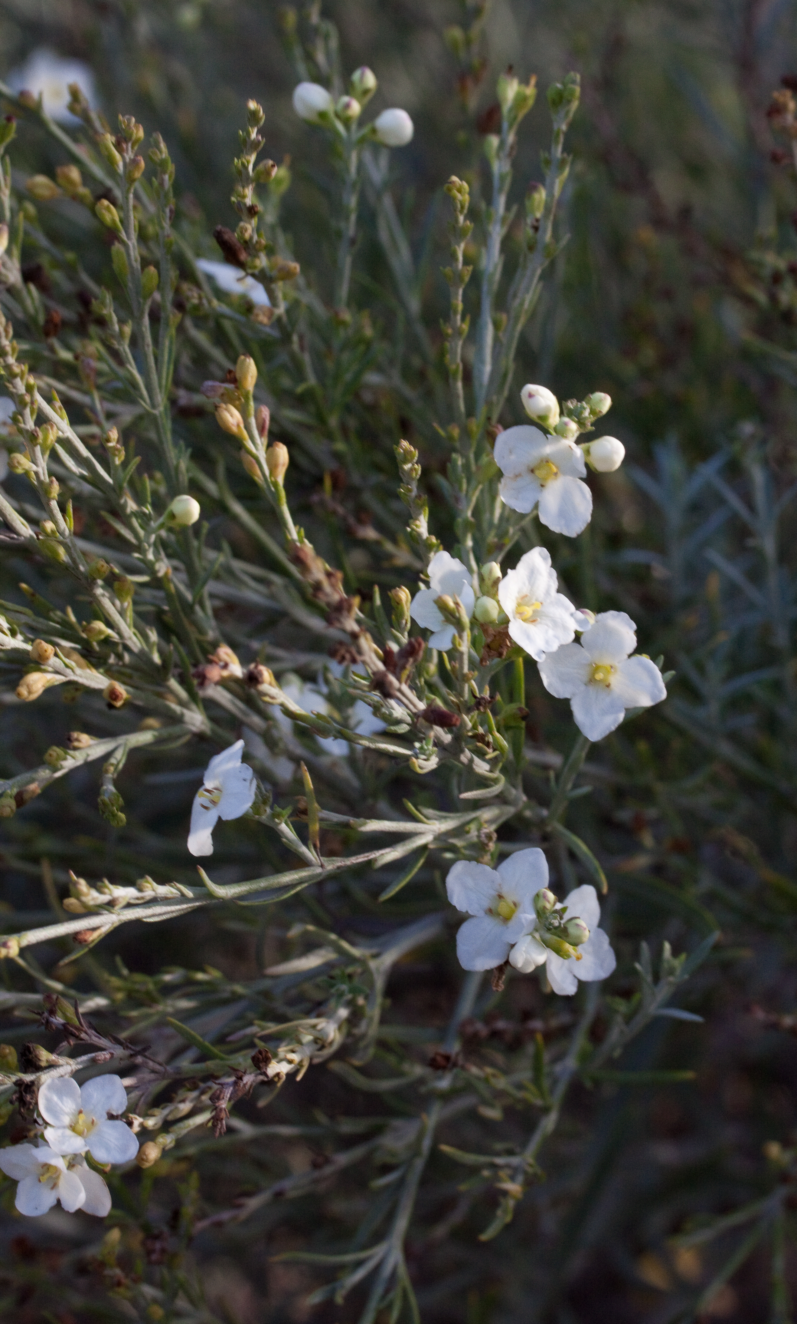 Fleurs de Gomphostigma virgatum - Jardin des Plantes - Paris - France